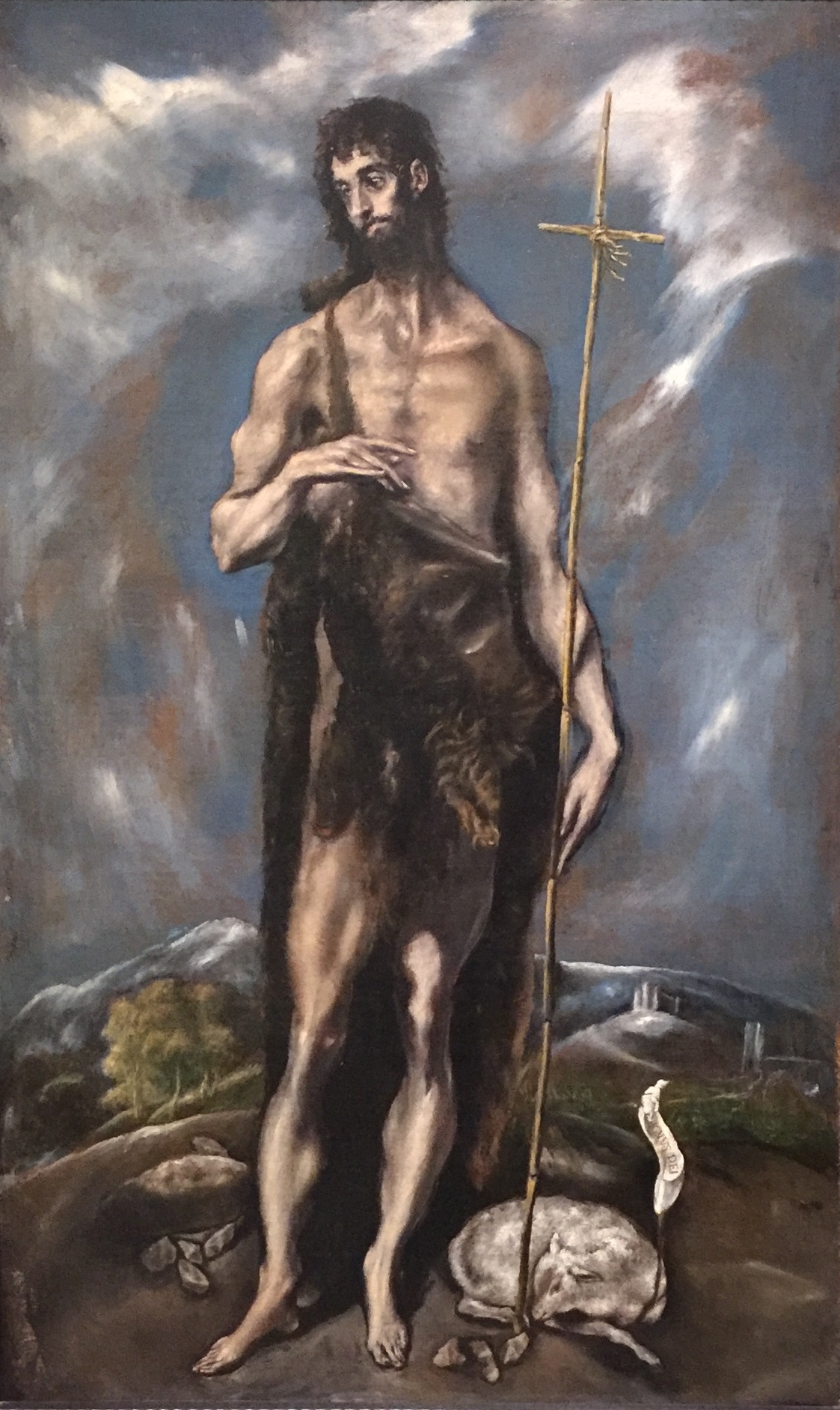 Jean le Baptiste est représenté en haillons contre un ciel tourmenté. Musée des beaux-arts de Valence (Espagne) (v. 1600-1605)